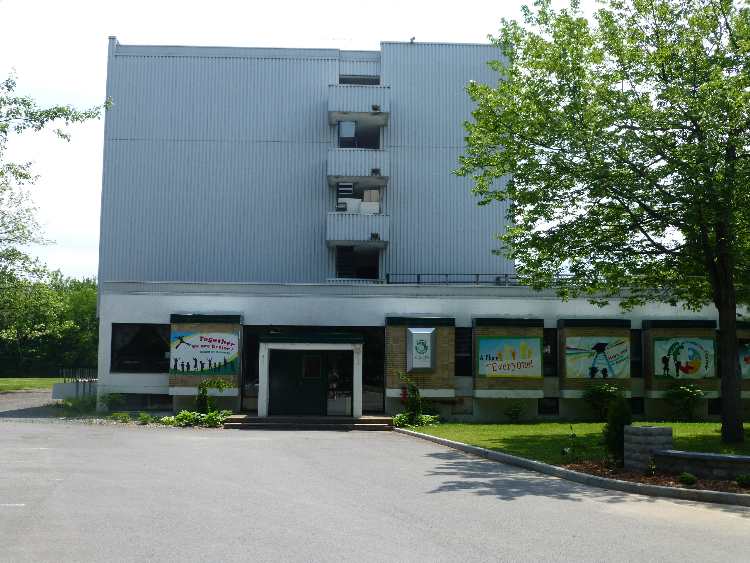 École Vision School, école bilingue privée constituée en société en commandite, située dans l'ancien pavillon des Missionnaires du Sacré-Coeur, sur les terrains des anciens Campus intercommunautaires de Cap-Rouge, à Saint-Augustin-de-Desmaures, Québec, Canada